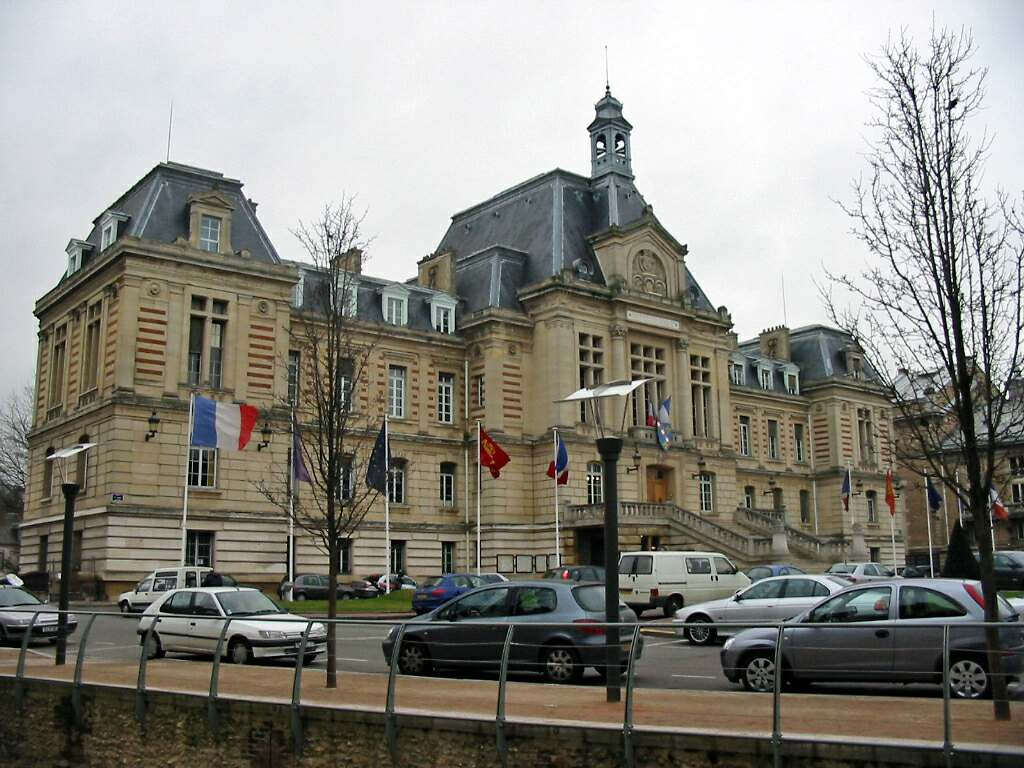 Mairie d'Évreux (Eure, France).